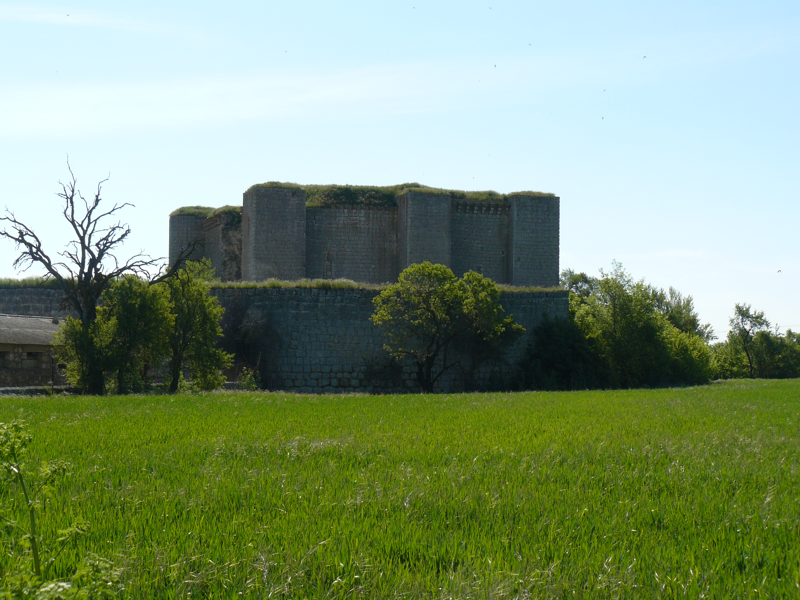 Villalba de los Alcores, Valladolid.